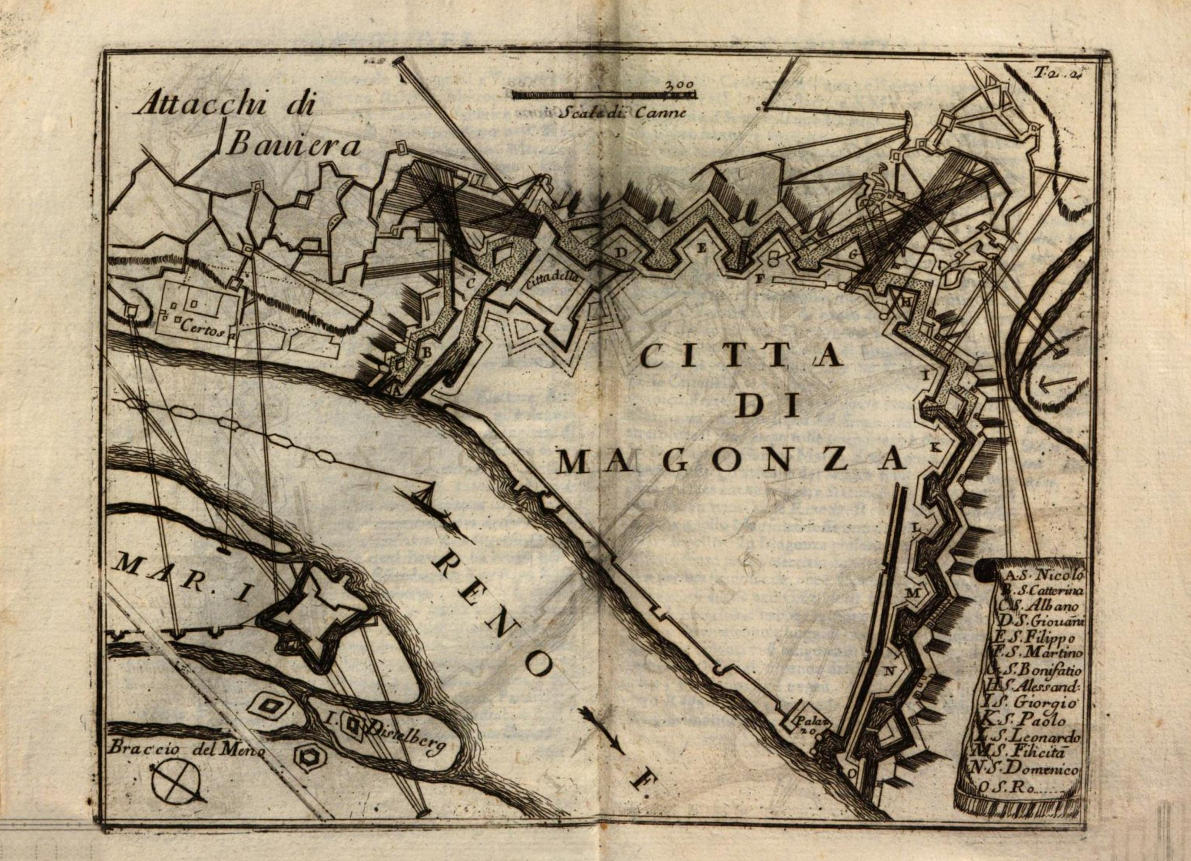 Viaggi del P. Coronelli parte prima [-seconda]. Consecrati all'illustriss., ed eccellentiss. signore conte Lazzaro Ferro di gloriosa memoria, e presentati all'illustriss., ... conte Giovanni di lui fratello, ..:. Consecrati all'illustriss., ed eccellentiss. signore conte Lazzaro Ferro di gloriosa memoria, e presentati all'illustriss., ... conte Giovanni di lui fratello, ..